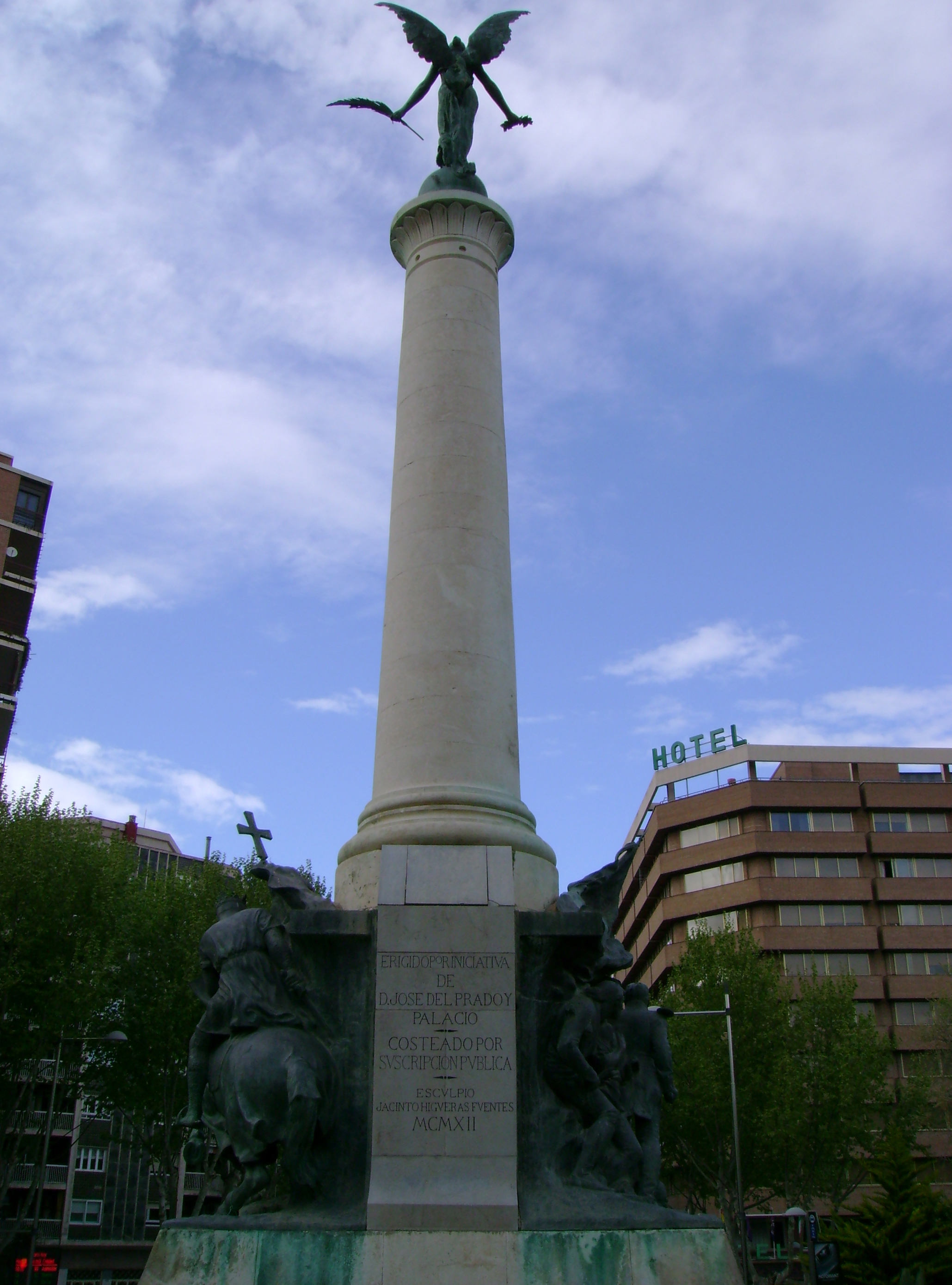 Vista trasera del Monumento a Las Batallas en la plaza homónima. Conmemoración de la Batalla de Las Navas de Tolosa y de la Batalla de Bailén. Obra del escultor Jacinto Higueras, 1912.